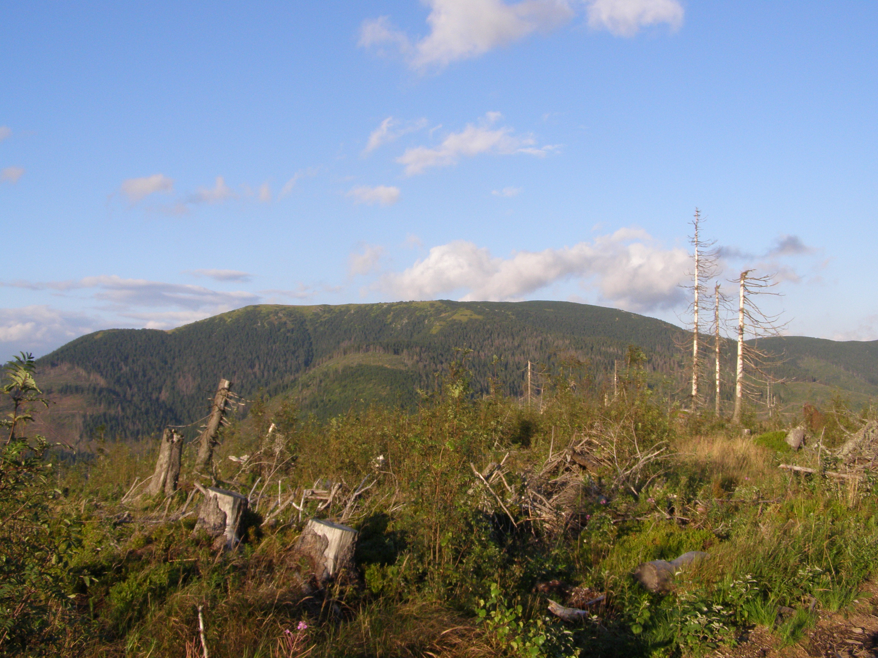 Nízké Tatry, Kráľovohoľské Tatry, pohled z východního úbočí vrcholu Kolesárová (1508 m) na východ: Veľká Vápenica (1691 m)